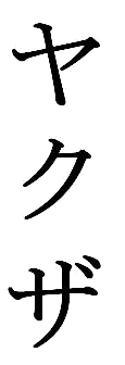 Yakuza écrit verticalement, en katakana